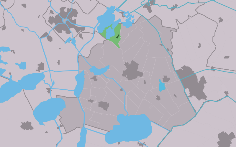 Kaartsje fan himrik fan Goaiïngaryp